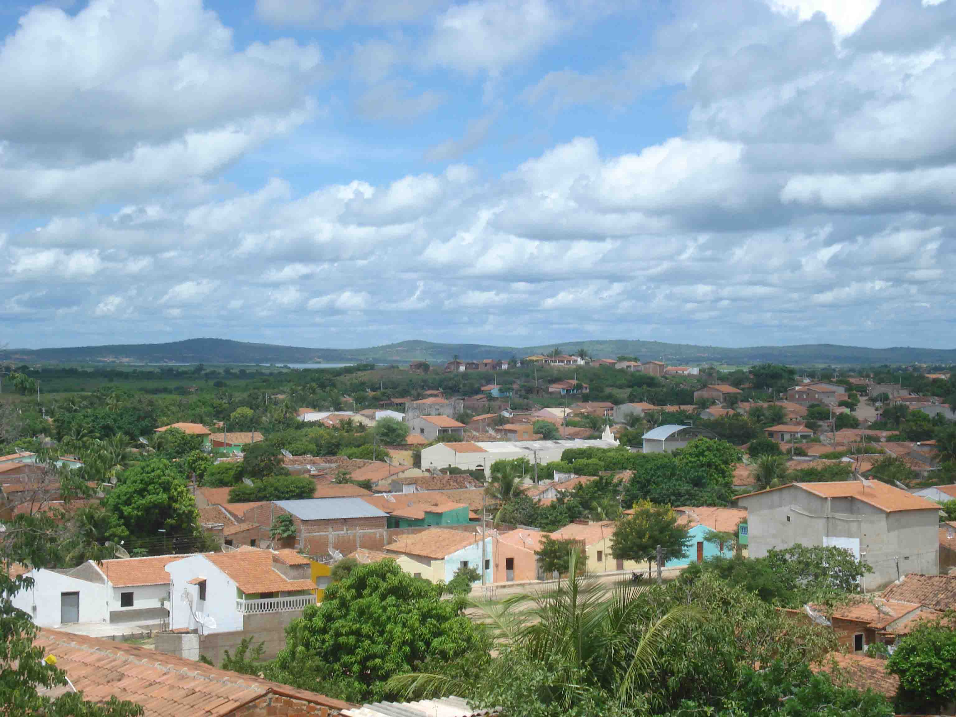 Vista cruzerio